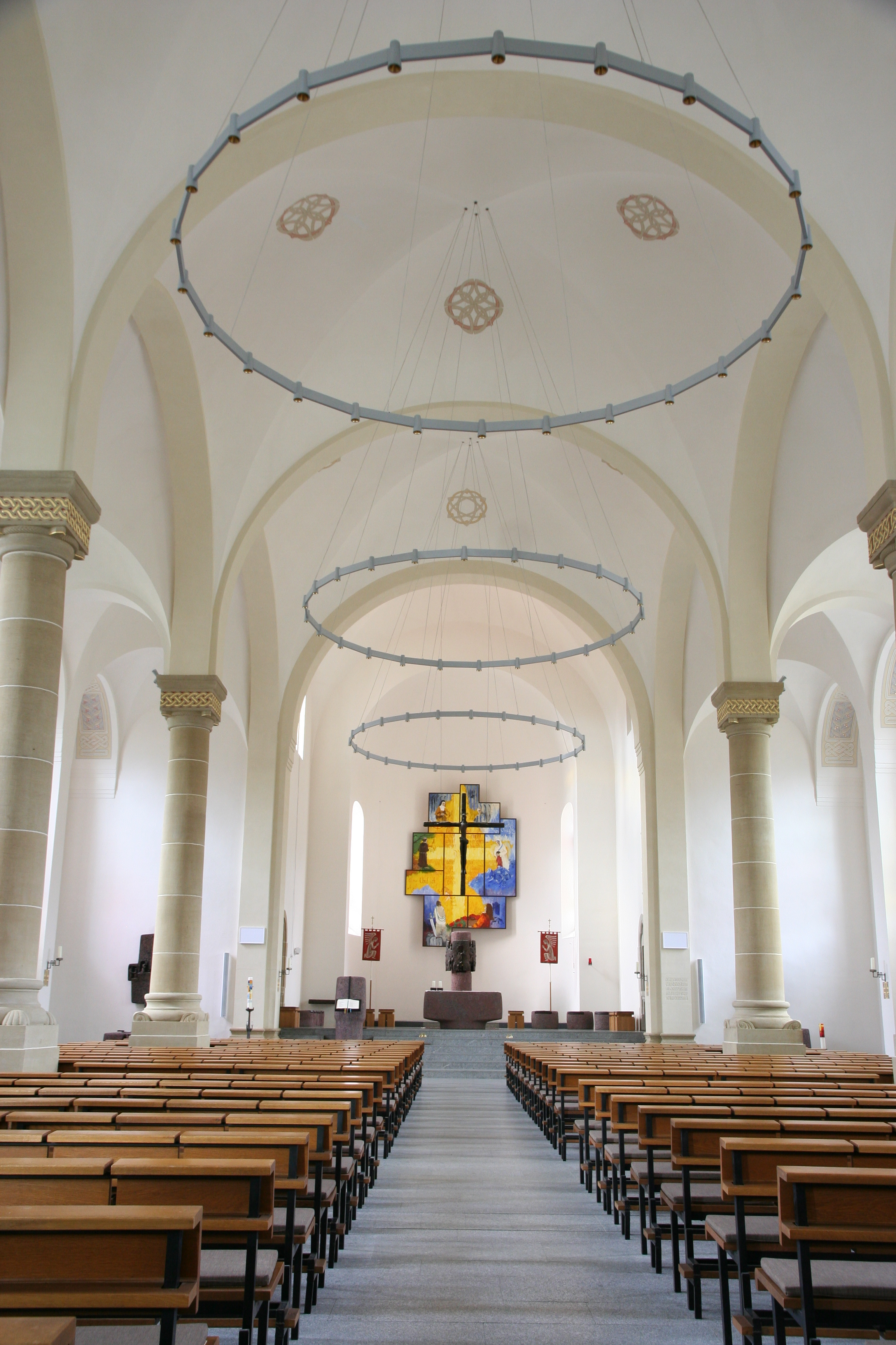 Römisch-katholische Pfarrkirche Herz-Jesu Obertsrot in Gernsbach